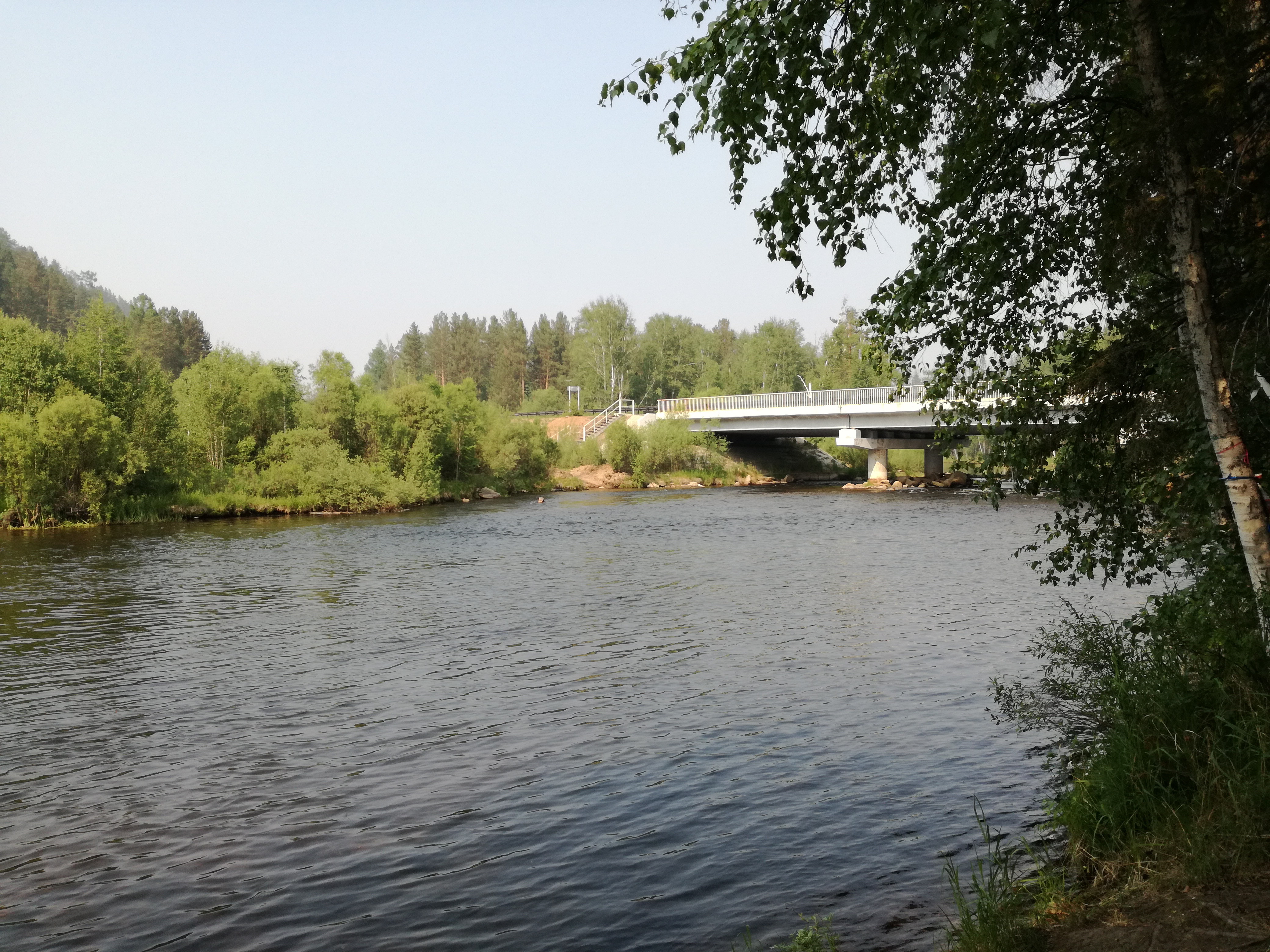 Река Хаим